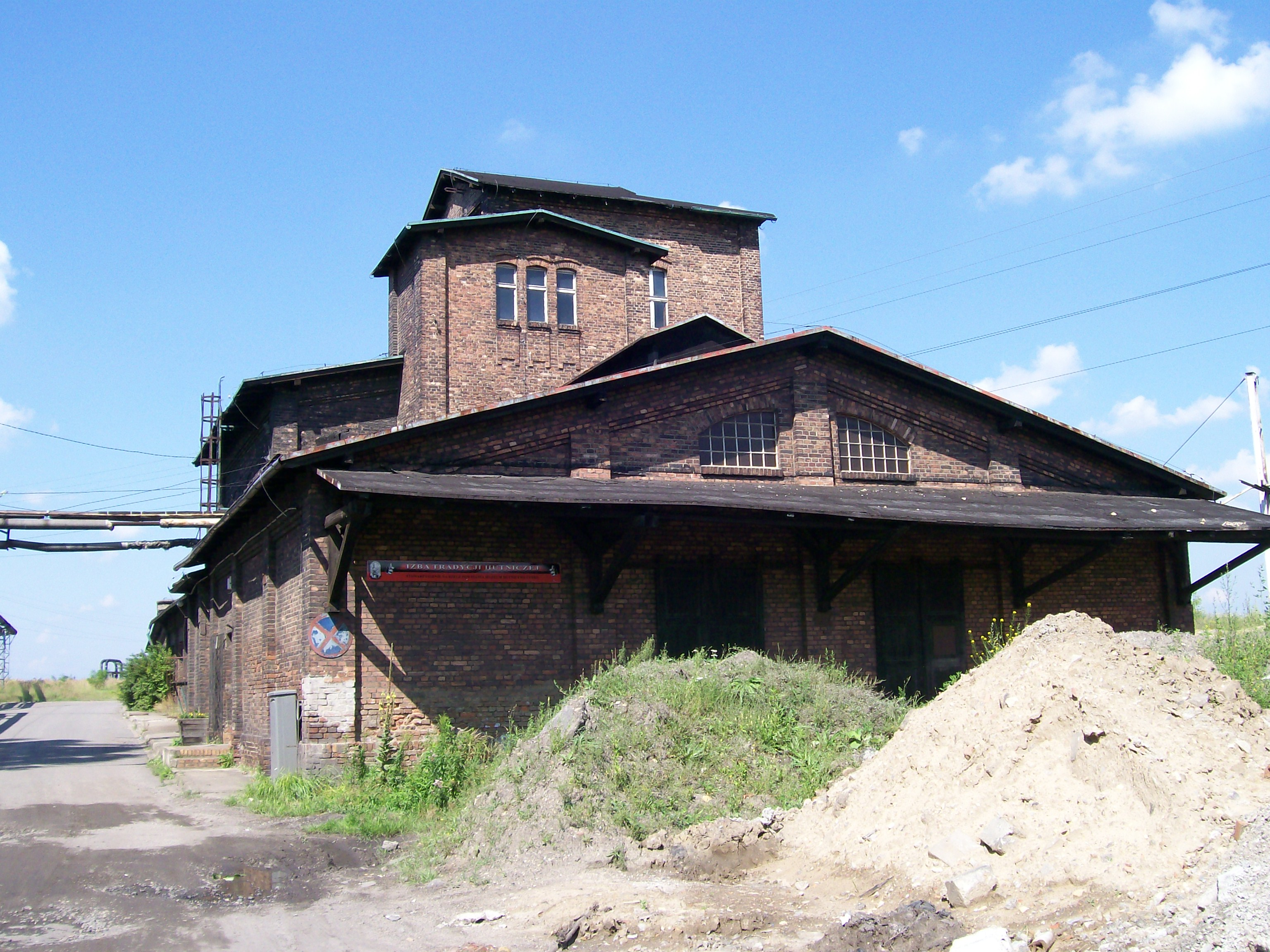 Izba Tradycji Hutniczych w Szopienicach.